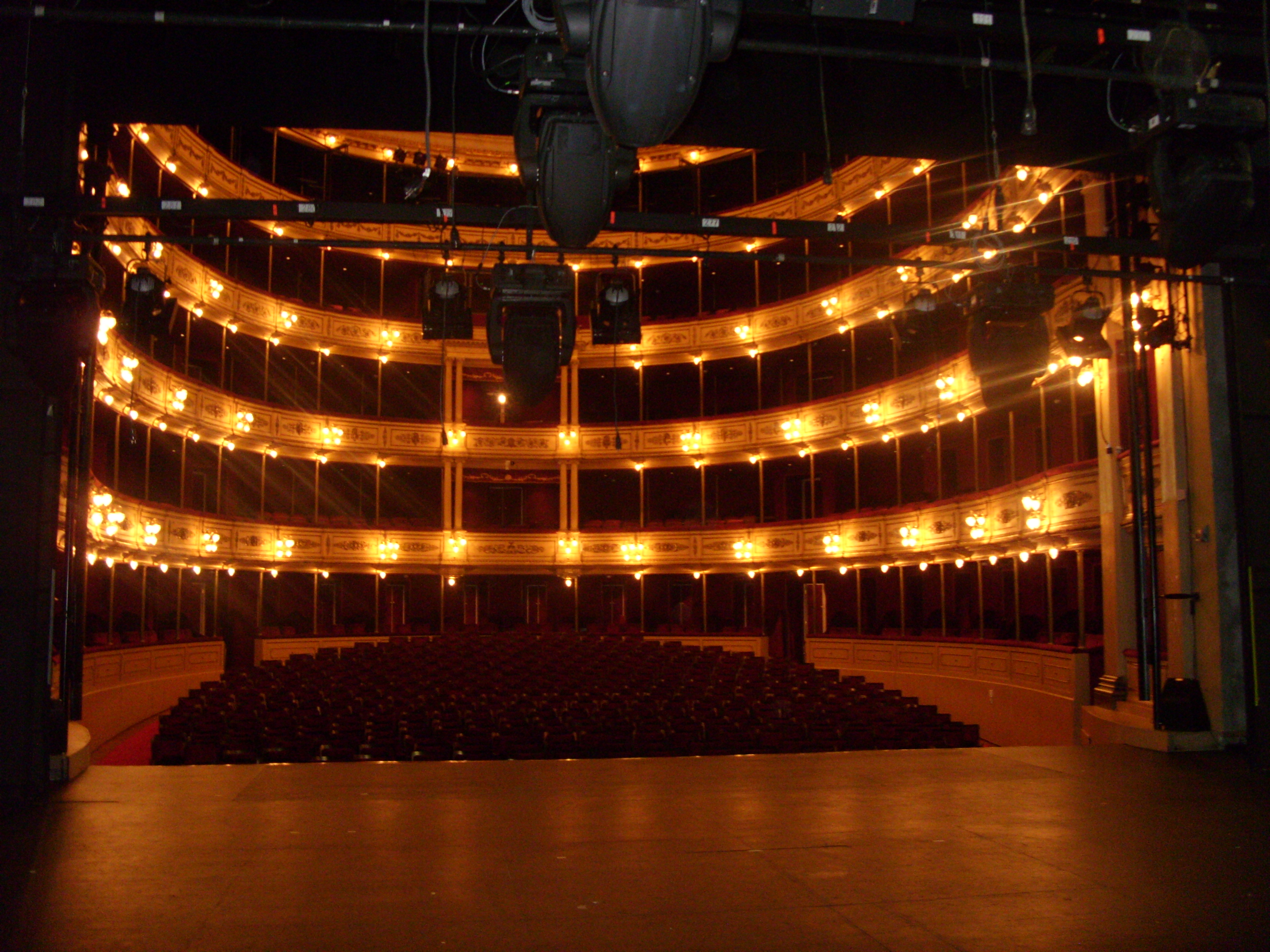 Imagen del interior del Teatro Solís (Montevideo, Uruguay)